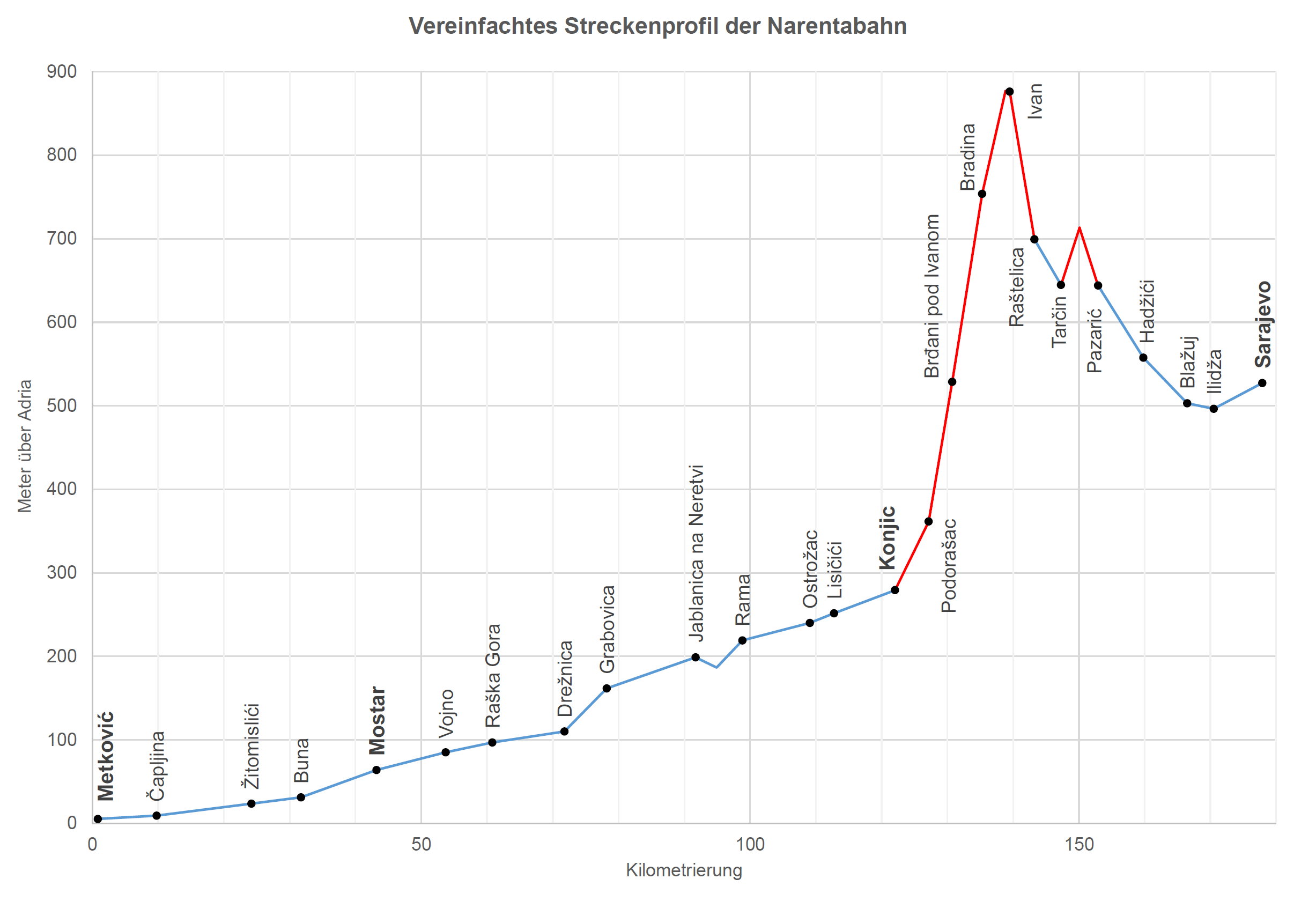 Vereinfachtes Streckenprofil der Narentabahn blau: Adhäsionsabschnitte rot: Zahnstange